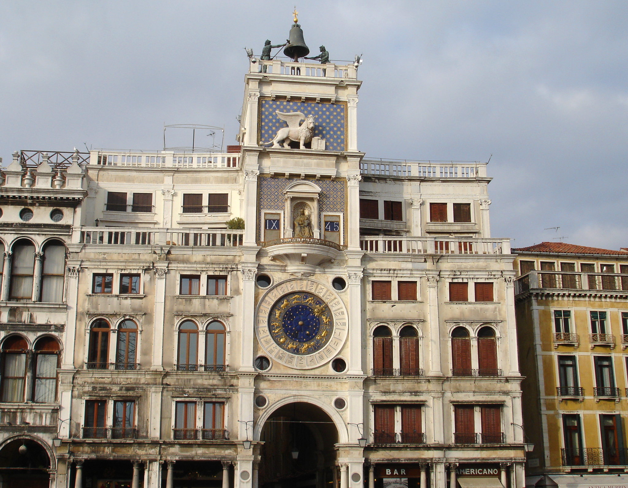 Torre dell'Orologio